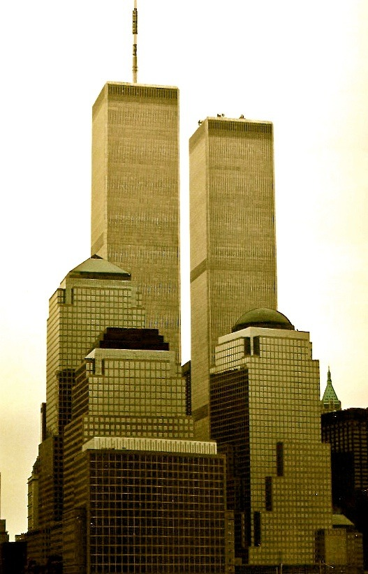 Diese Aufnahme wurde im Spätsommer 2000 in New York mit einer Minolta Dynax 7xi gemacht.